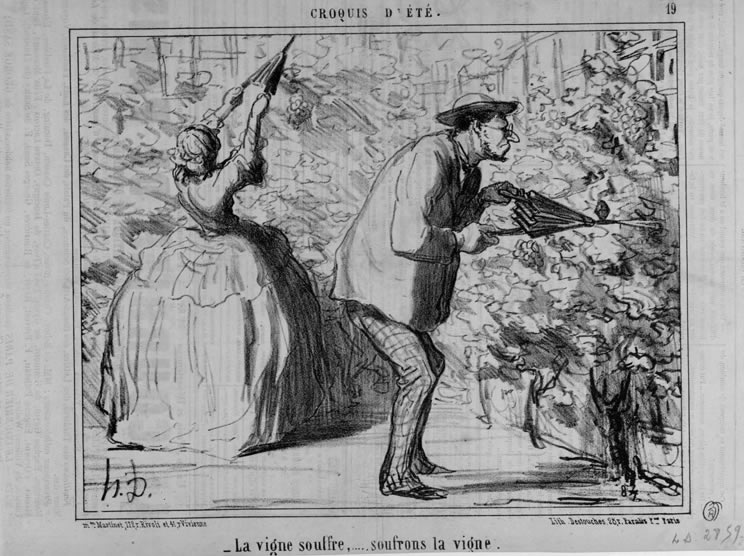 Lithographie, 257 x 204 mm, Le Charivari, 12.08.1857